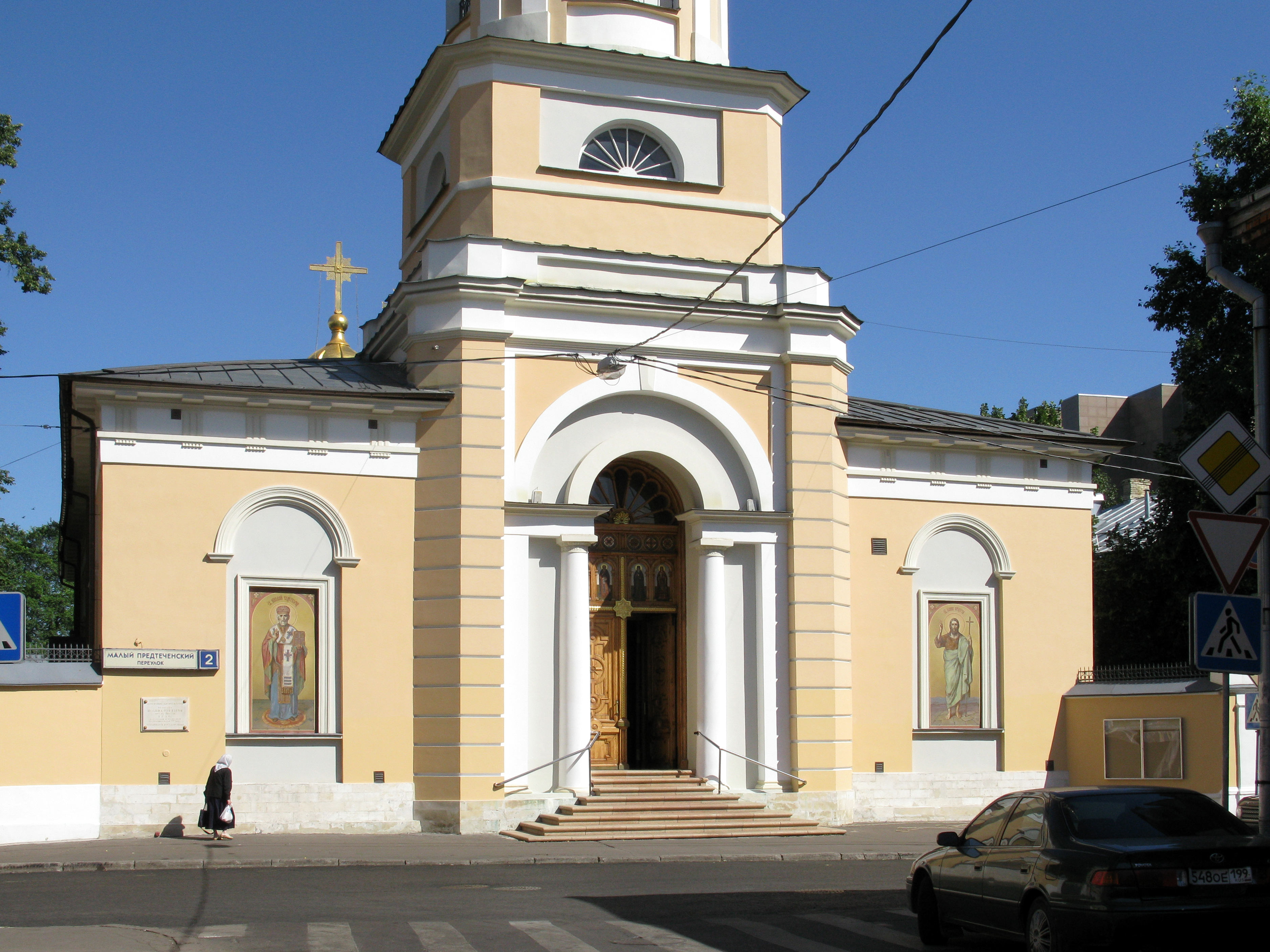 Храм Рождества Иоанна Предтечи на Пресне (Москва)